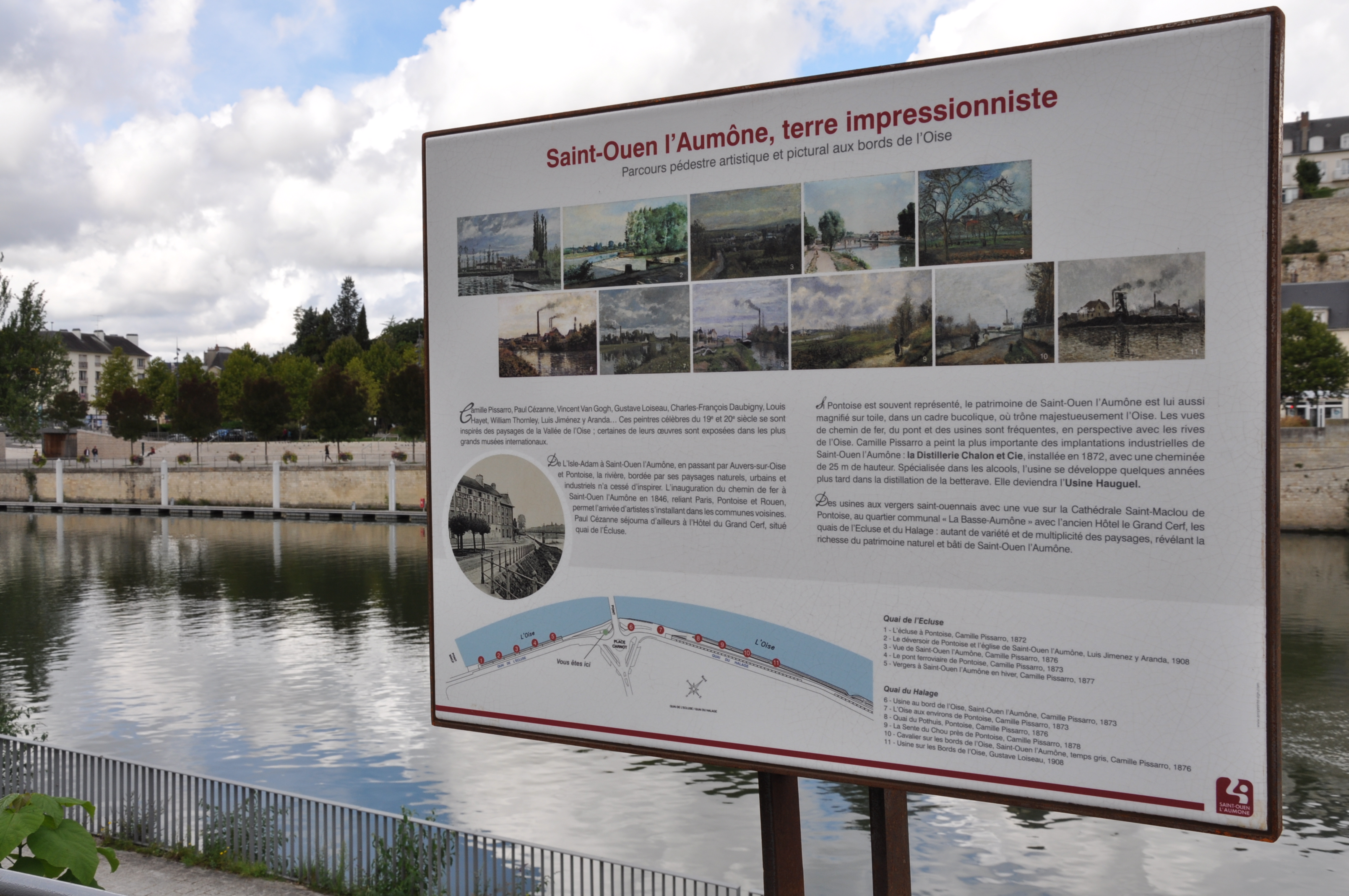 Parcours impressionniste situé sur les bords de l'Oise